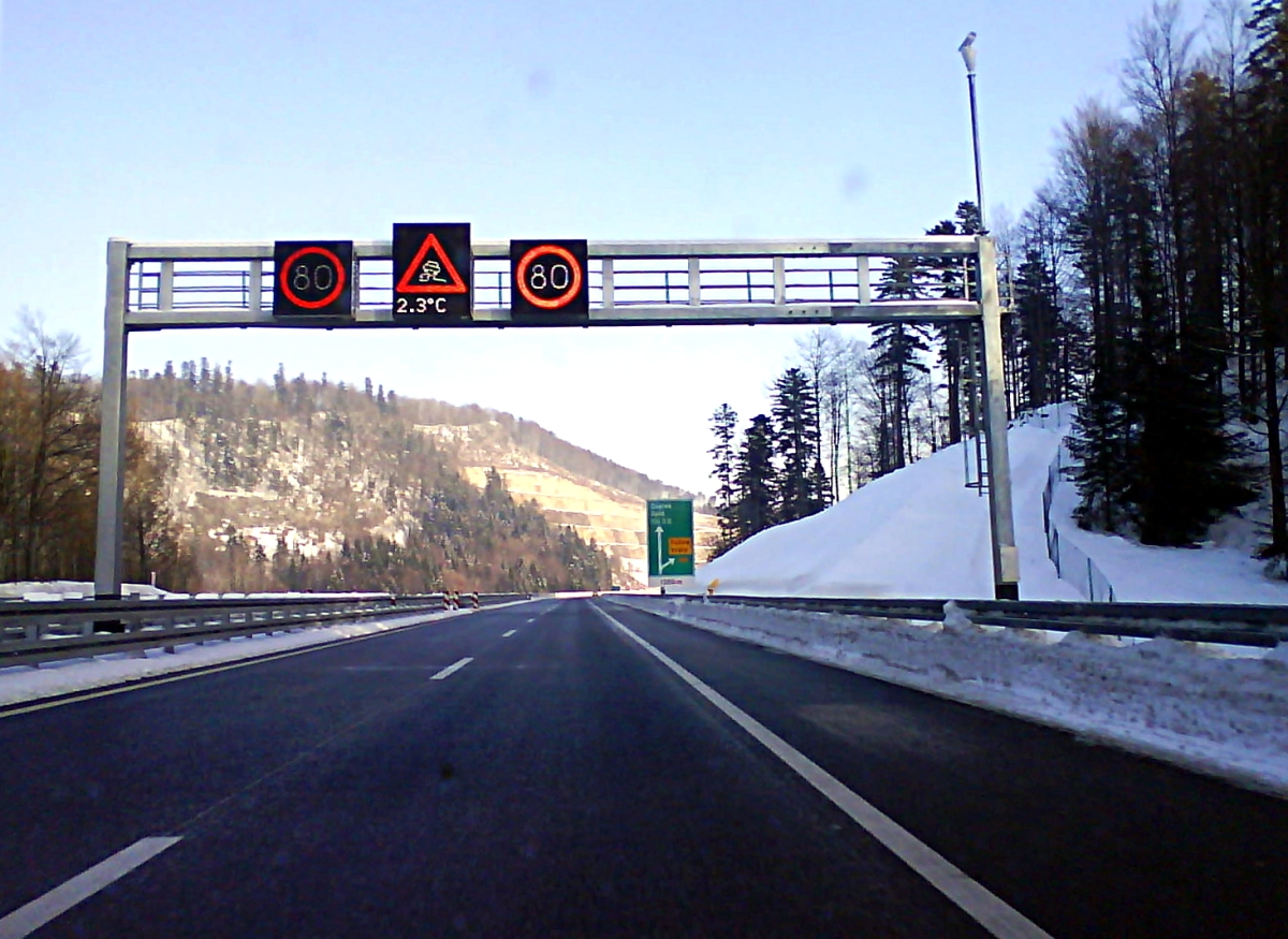 Autocesta A6